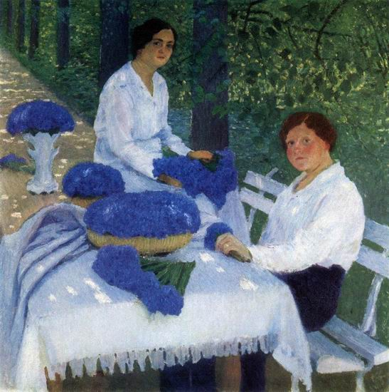 Group portrait with cornflowers (Васильки. Групповой портрет), 1914